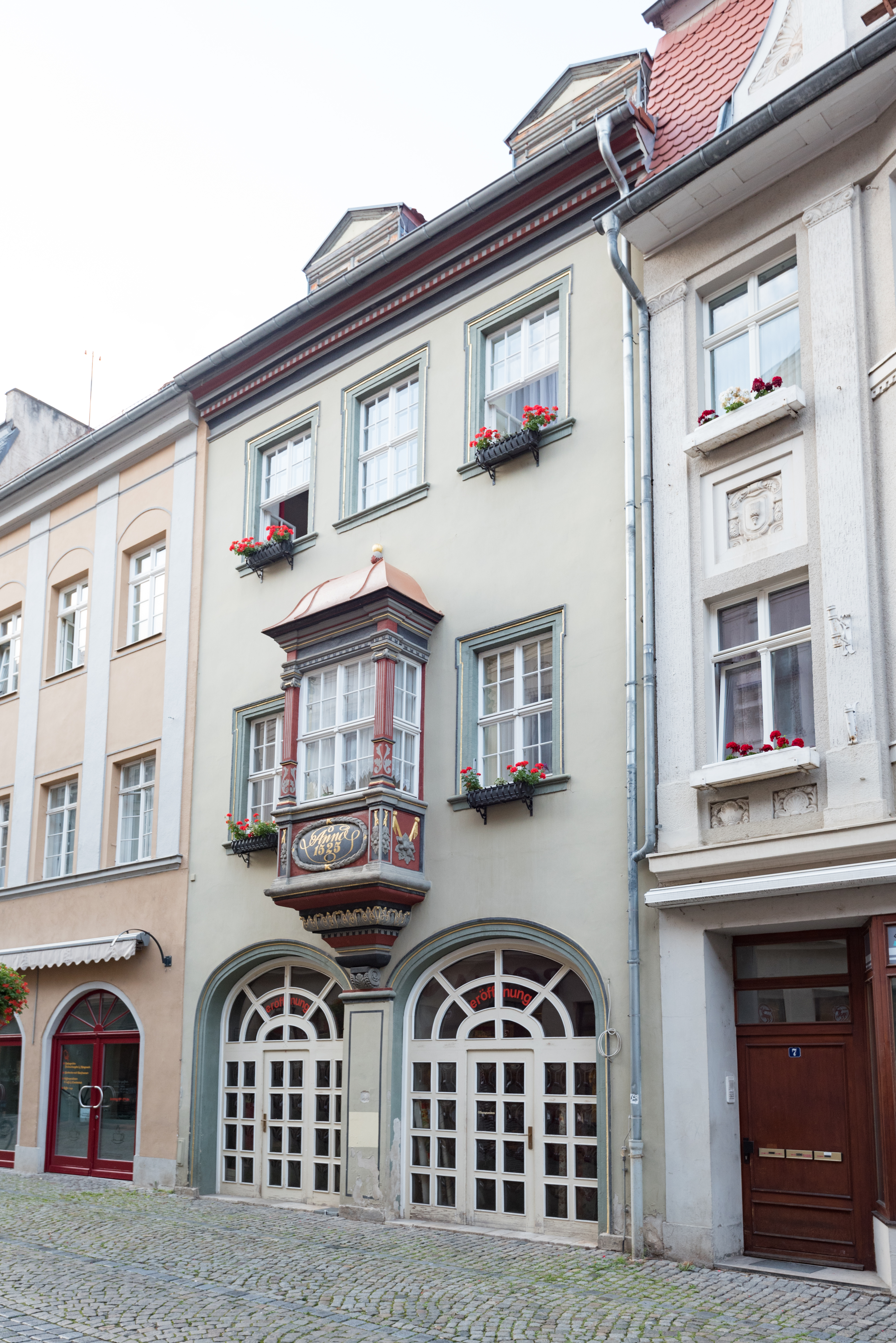 Naumburg (Saale), Herrenstraße 8